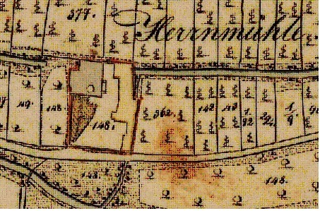 Ortsteil und Mühle, Herrnmühle im Urkataster von 1833